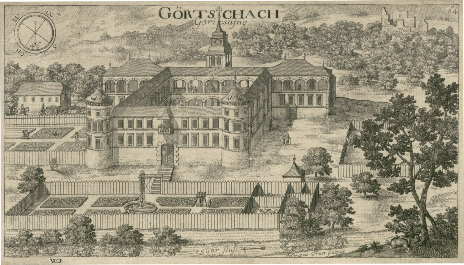 Dvorec in grad Goričane